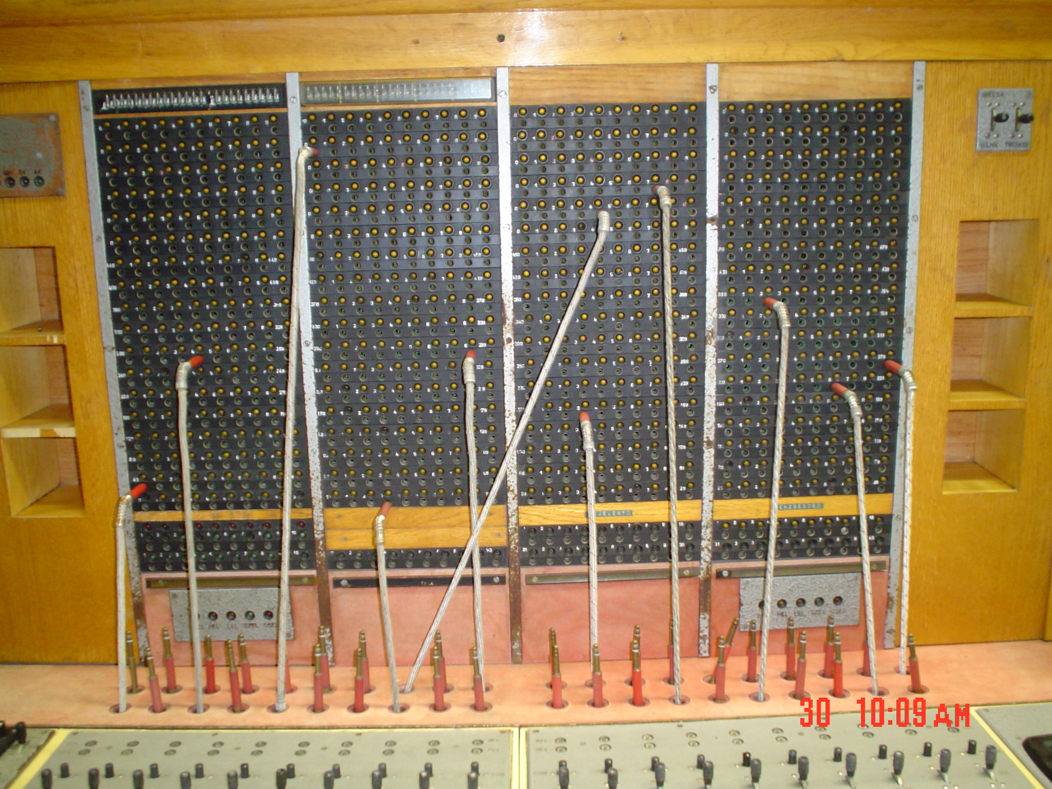 Moderna_mana_telefoncentralo, kiu anstataŭ lampoj uzas LED-ojn.